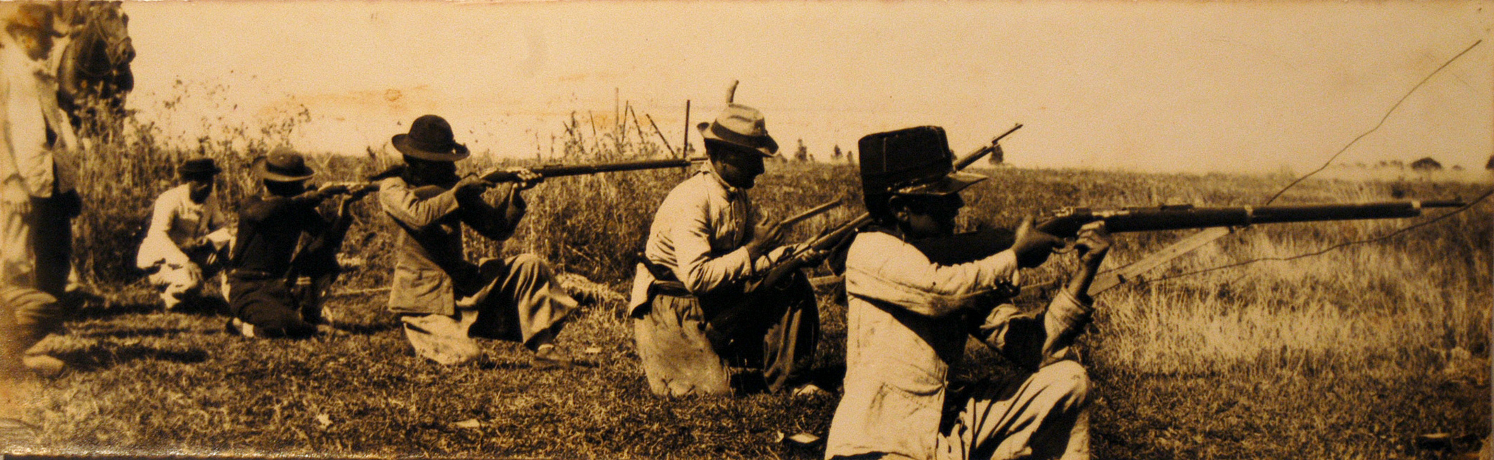 Fotografía de fuerzas saravistas realizando prácticas de tiro, en el marco de la revolución de 1904 en Uruguay.